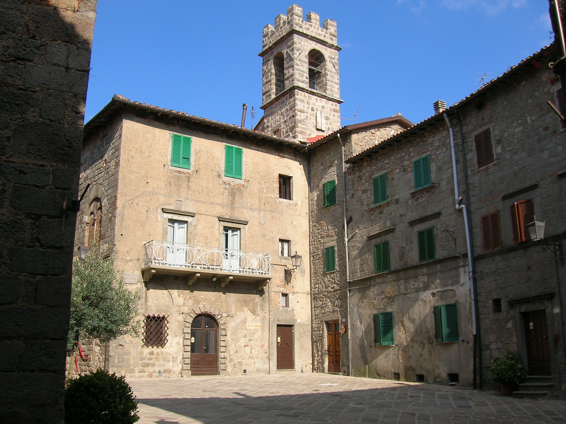 Piazza Santa Croce, Abbadia San Salvatore, provincia di Siena, Toscana, Italia.